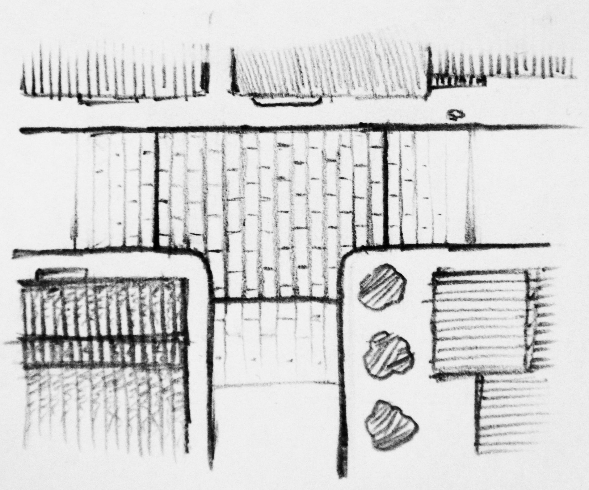 Schemazeichnung Aufpflasterung